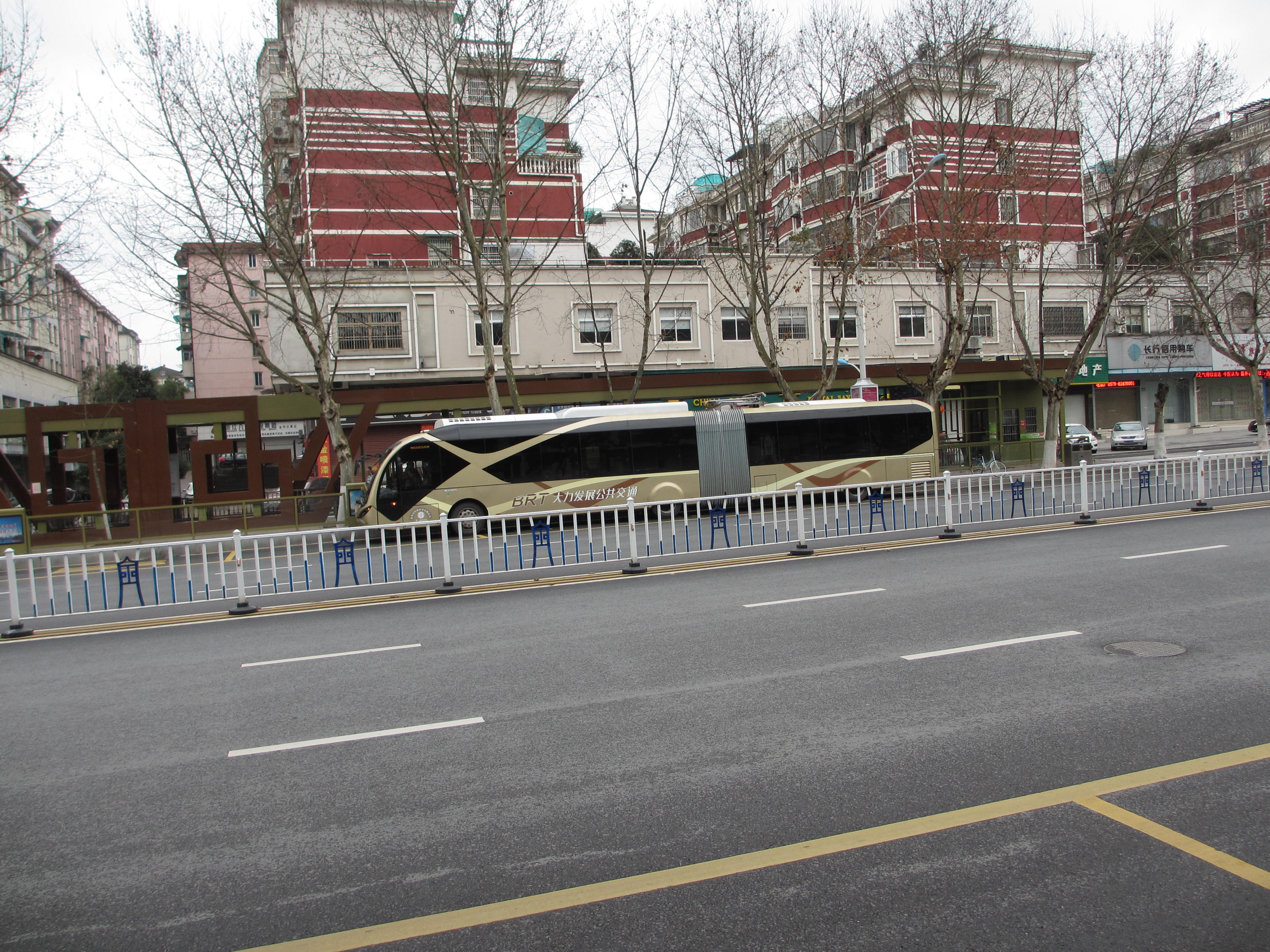 金华快速公交1号线（支线）车辆。